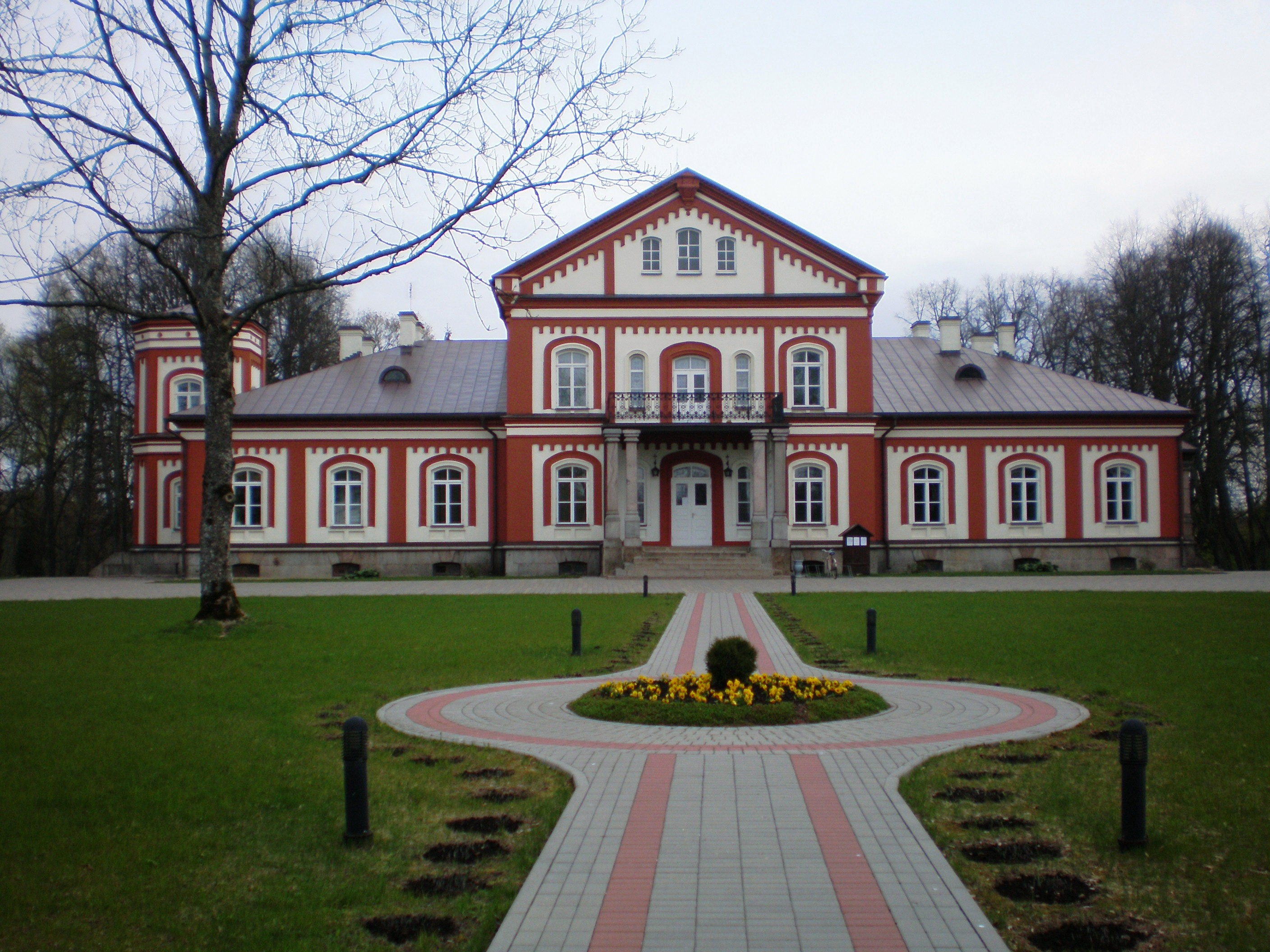 Alantos dvaras Naujasodyje, Molėtų raj. 2007.05.04 Foto: Hugo.arg